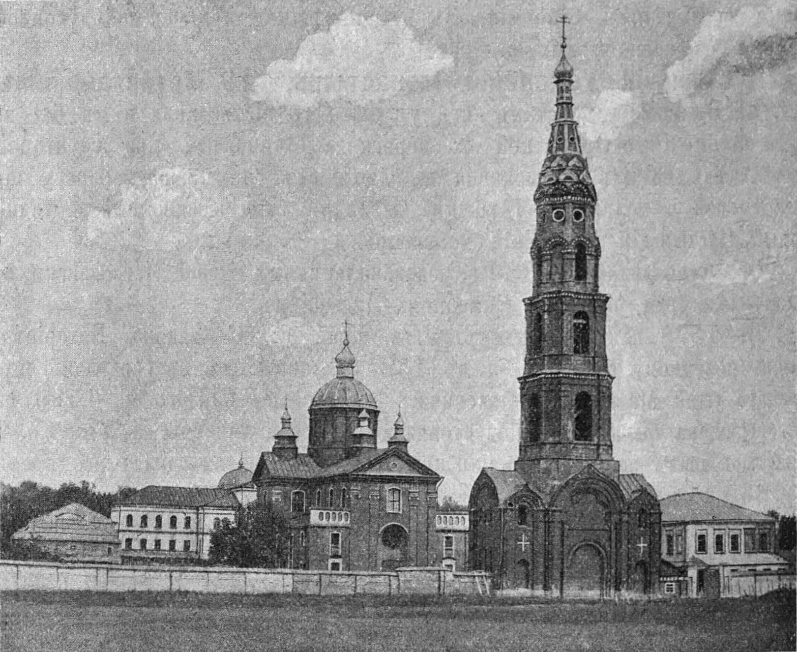 Беларуская (тарашкевіца): Пустынкі (Pustynki). Манастыр Прачыстай Багародзіцы па маскоўскай разбудове